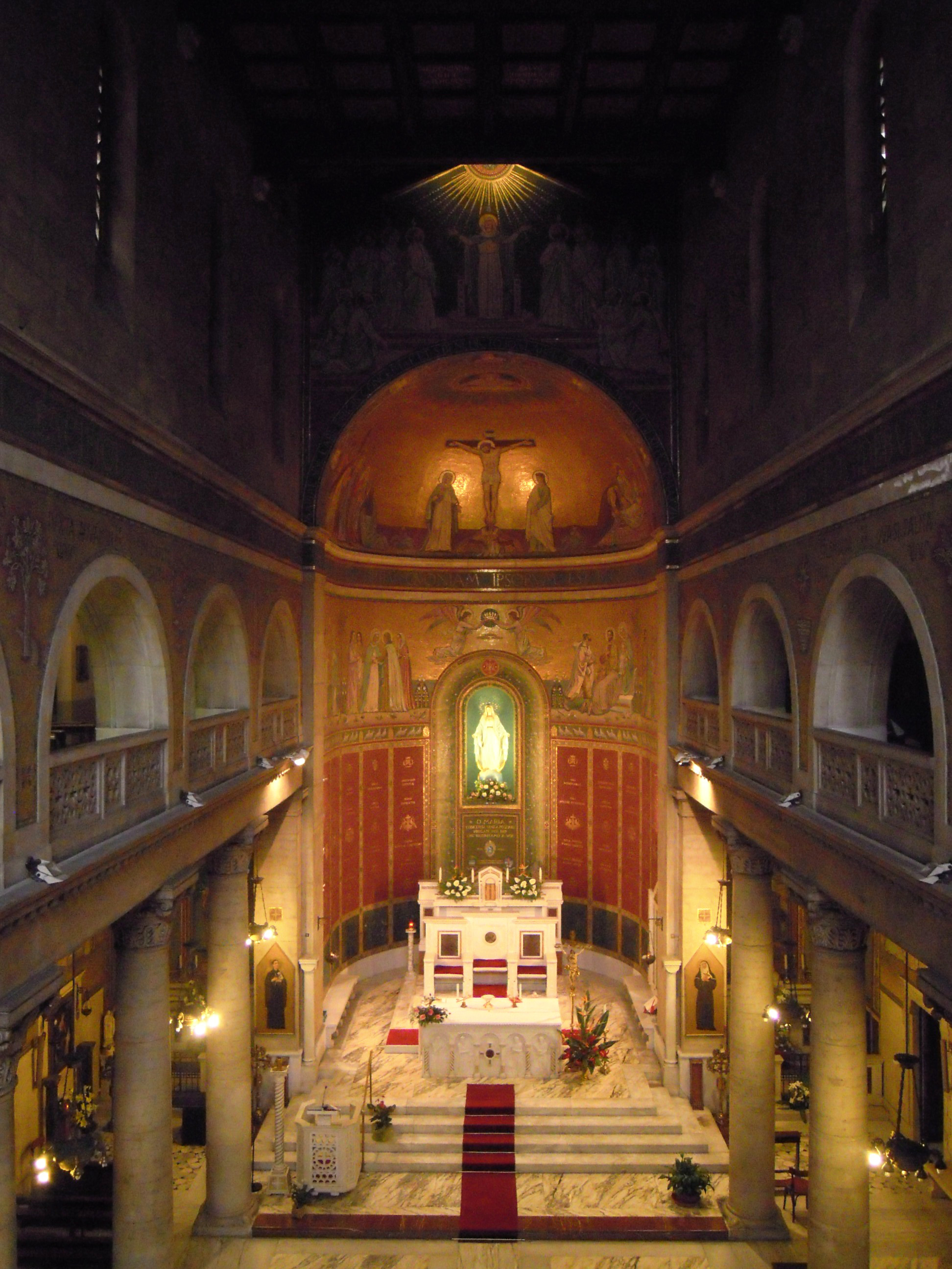 L'interno dal matroneo.